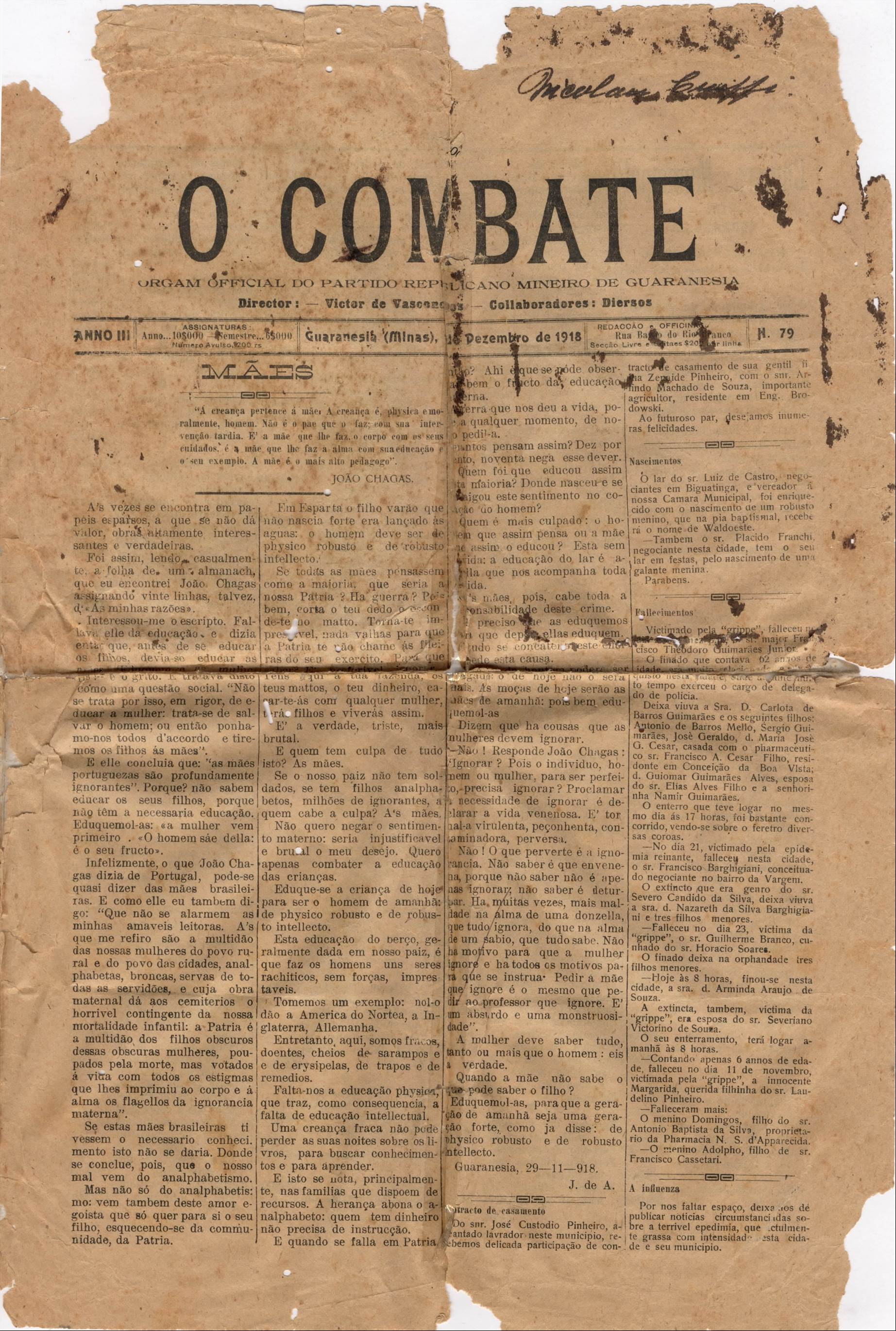 Primeira página da edição 79 do jornal "O Combate", da cidade mineira de Guaranésia, em 1918.